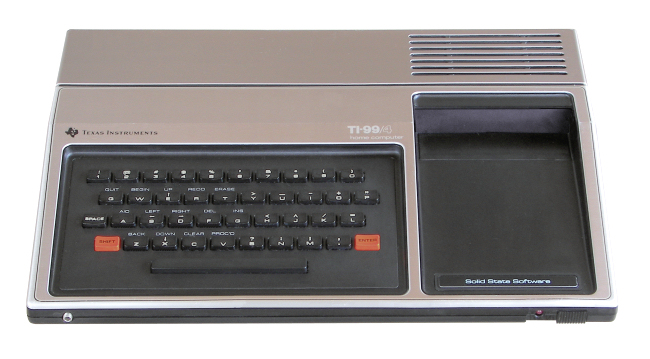 Foto eines Texas Instruments TI-99/4 (Vorderansicht)